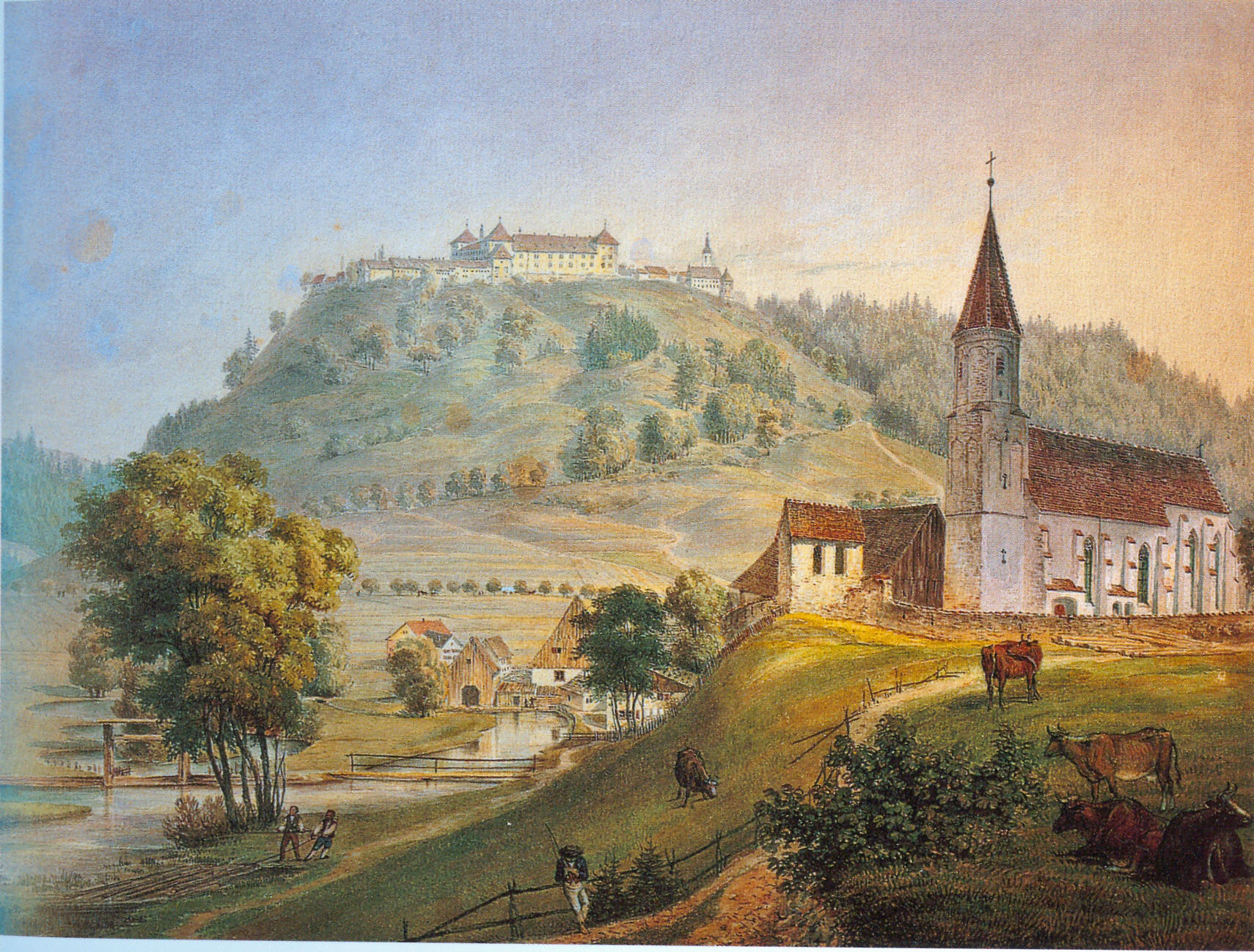 Caspar Obach: Residenzschloss Zeil von Süden, im Vordergrund Filialkirche St. Magnus und Mühle von Unterzeil. Aquarell